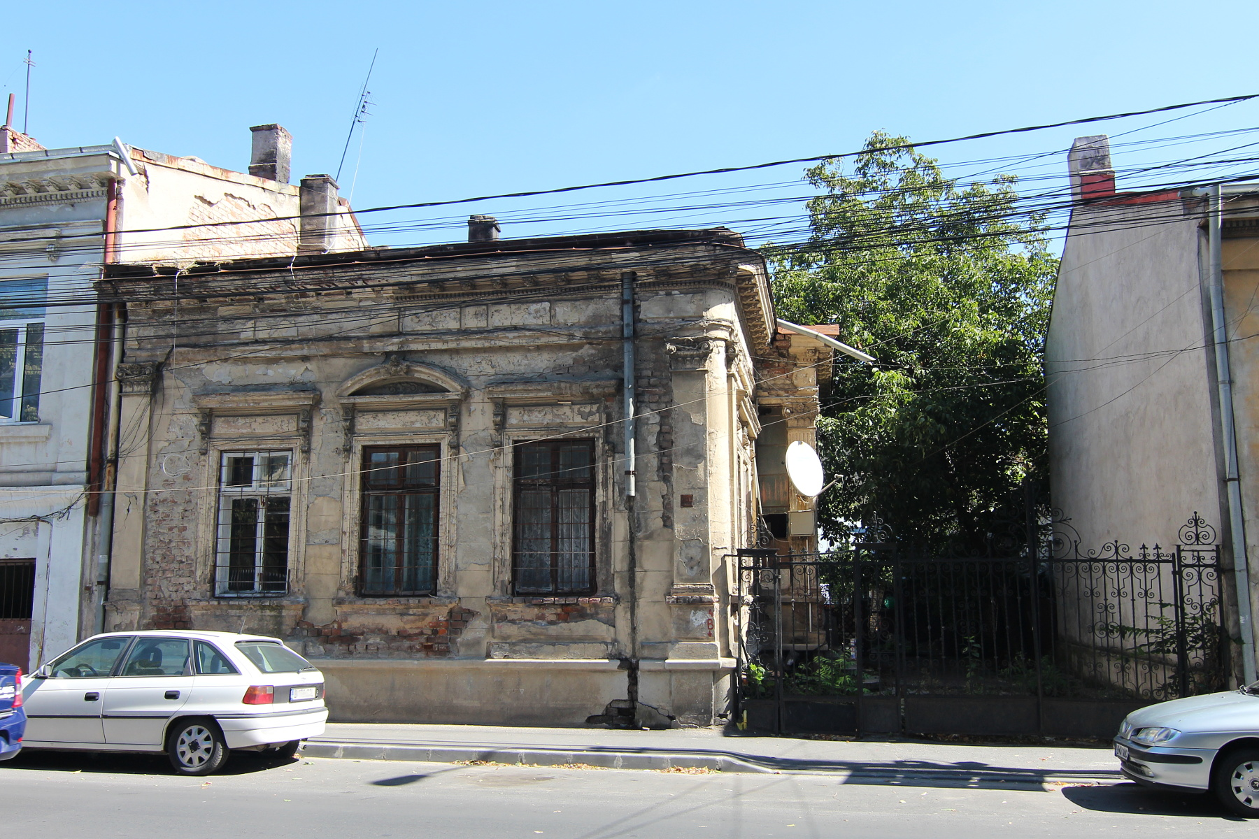 Casă pe strada Traian